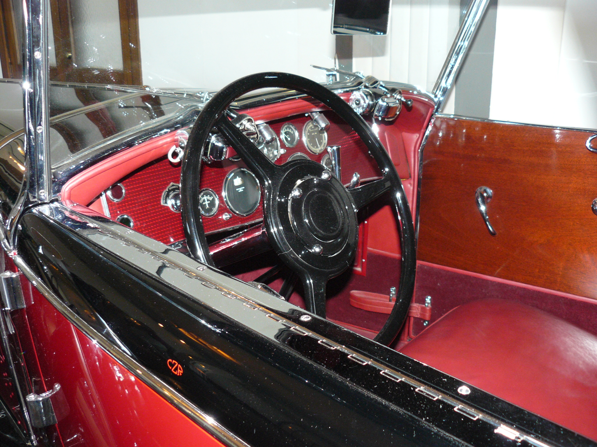 Auburn Muséum.